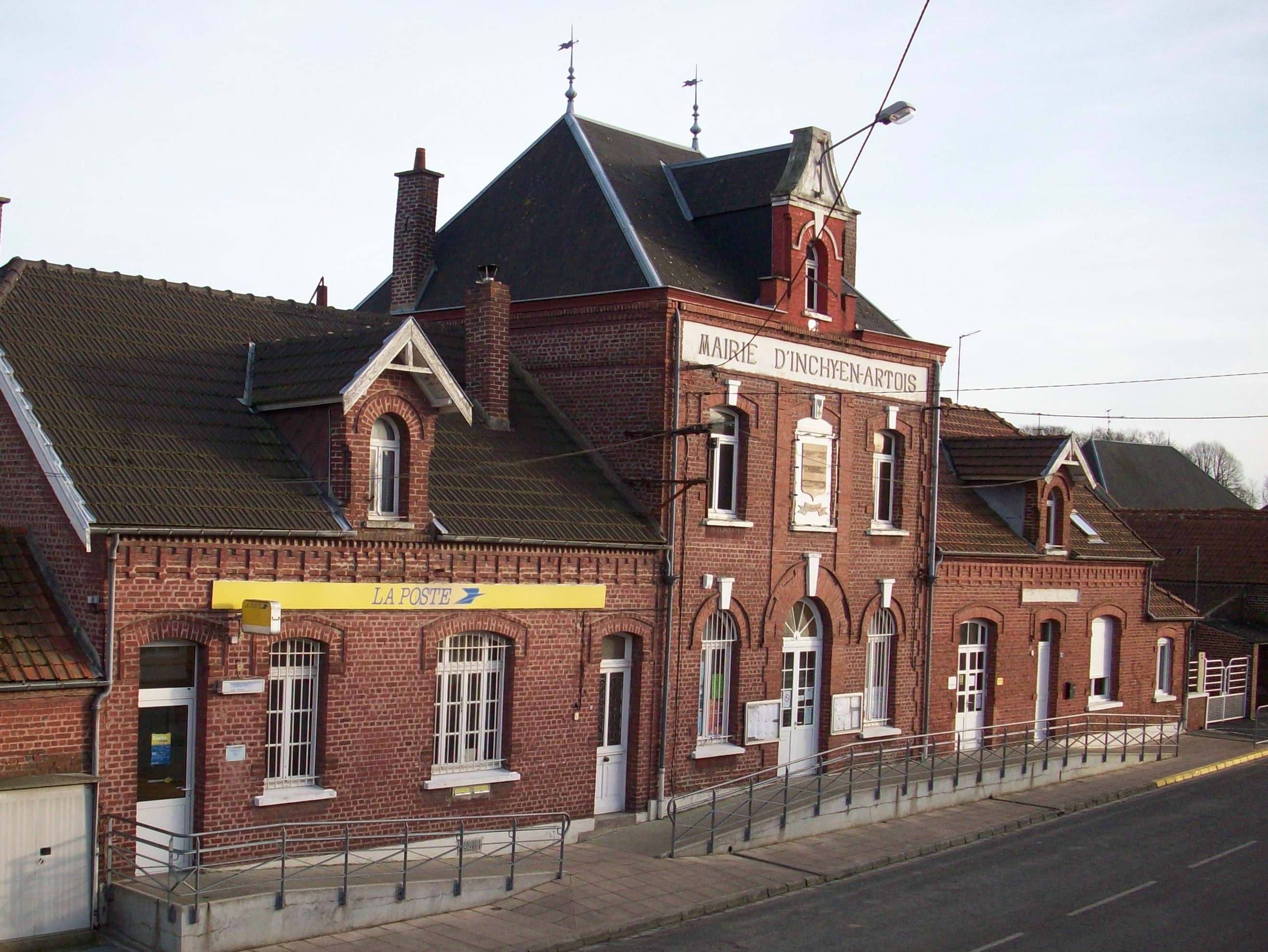 Façade de la mairie d'Inchy en Artois